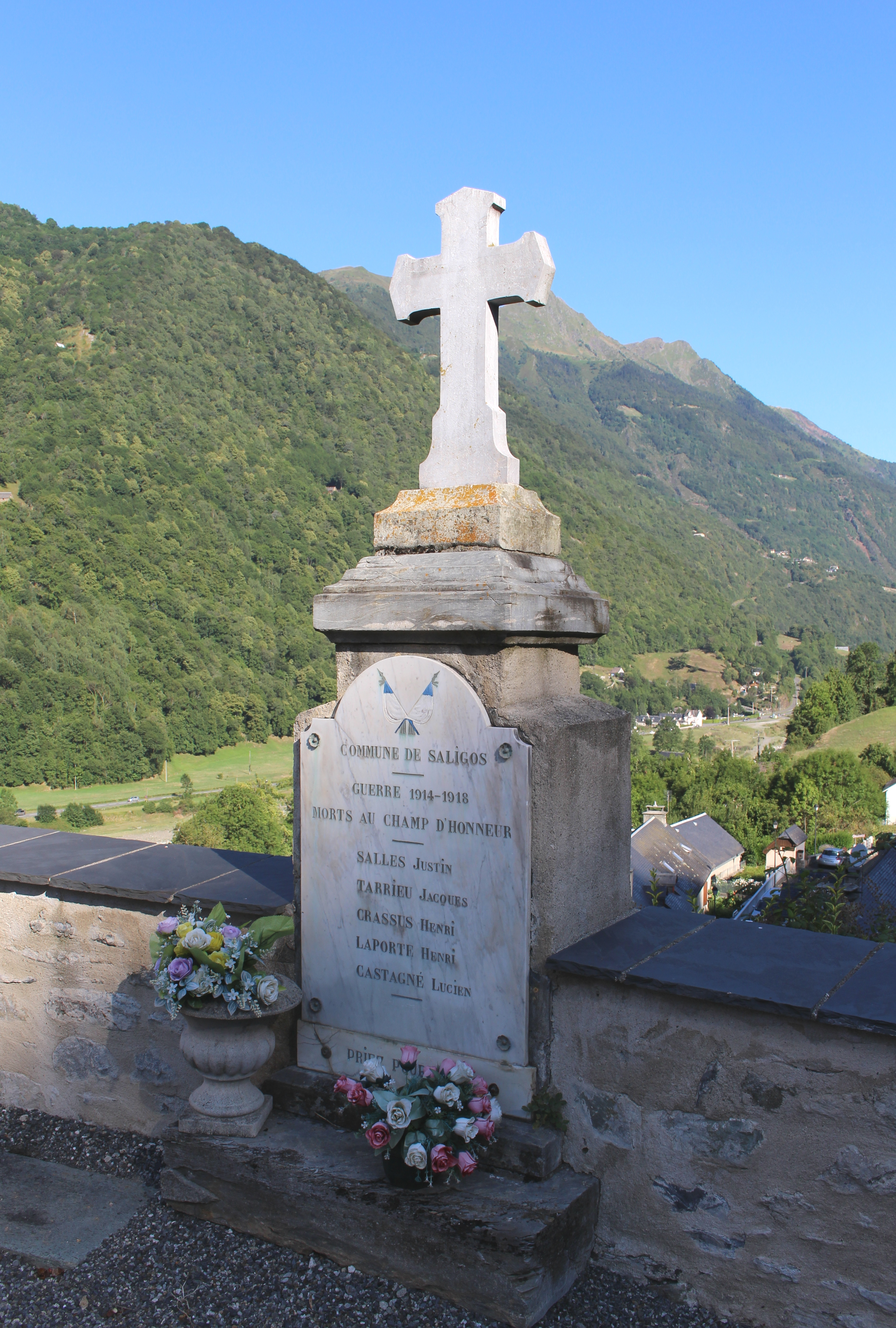 Monument aux morts de Saligos (Hautes-Pyrénées)